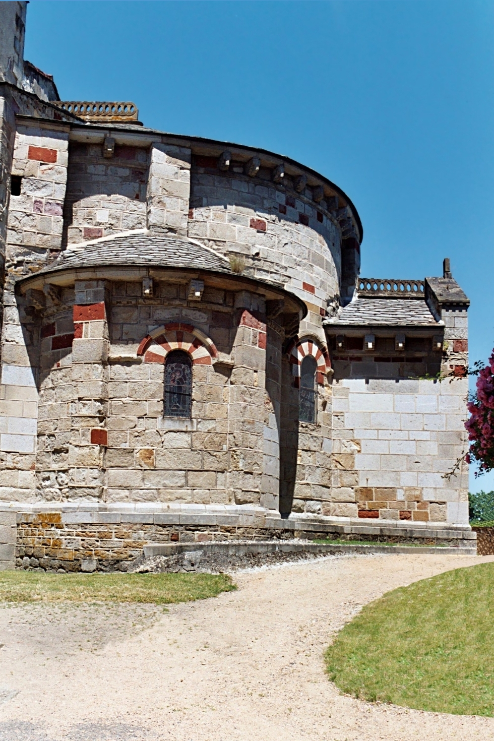 France - Auvergne - Église Saint-Didier de Saint-Dier-d'Auvergne